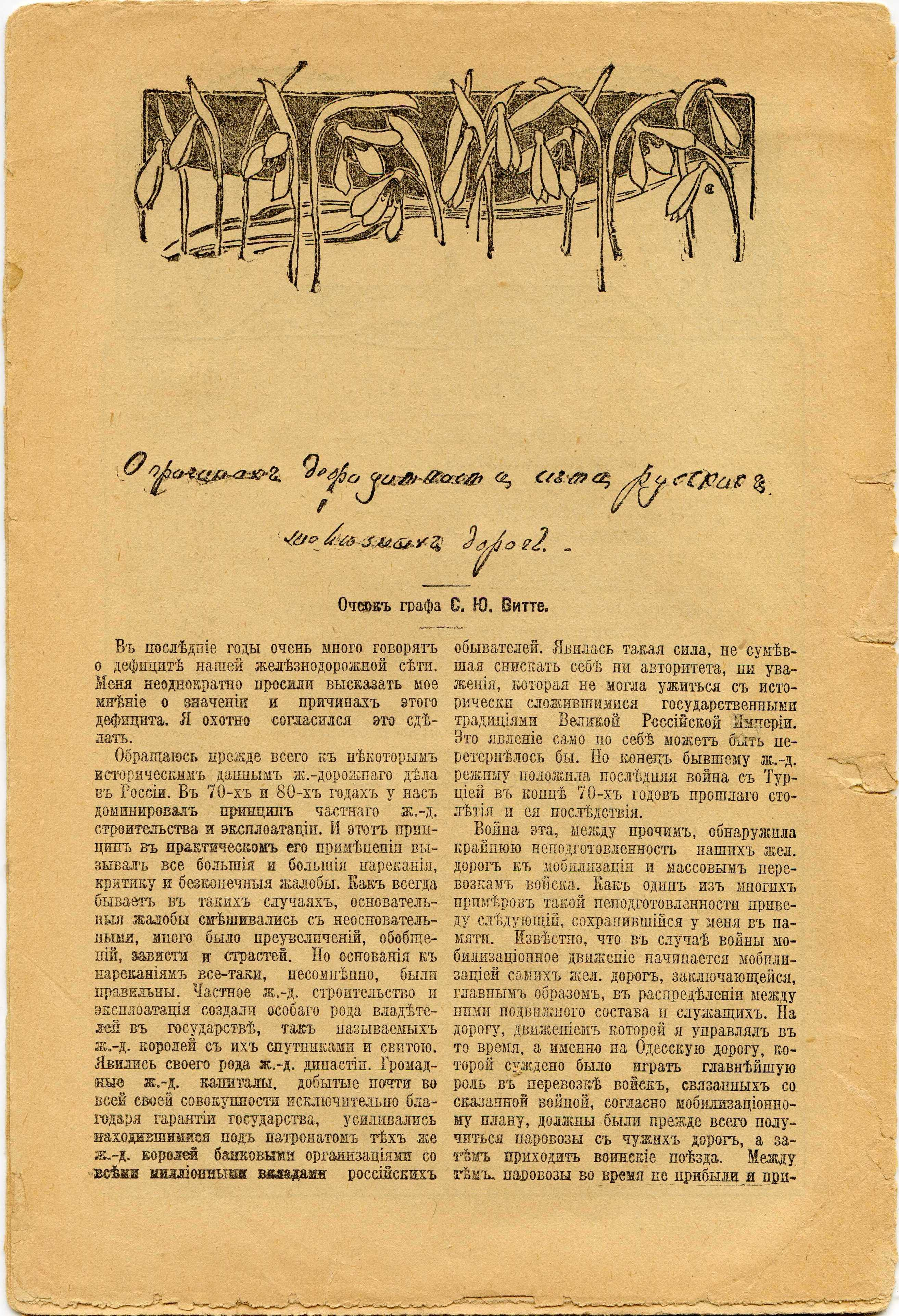 Sergei Witte in Russian magazine Novoe Slovo, 1910.